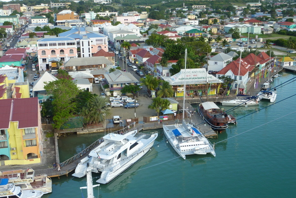 Antigua St. John´s